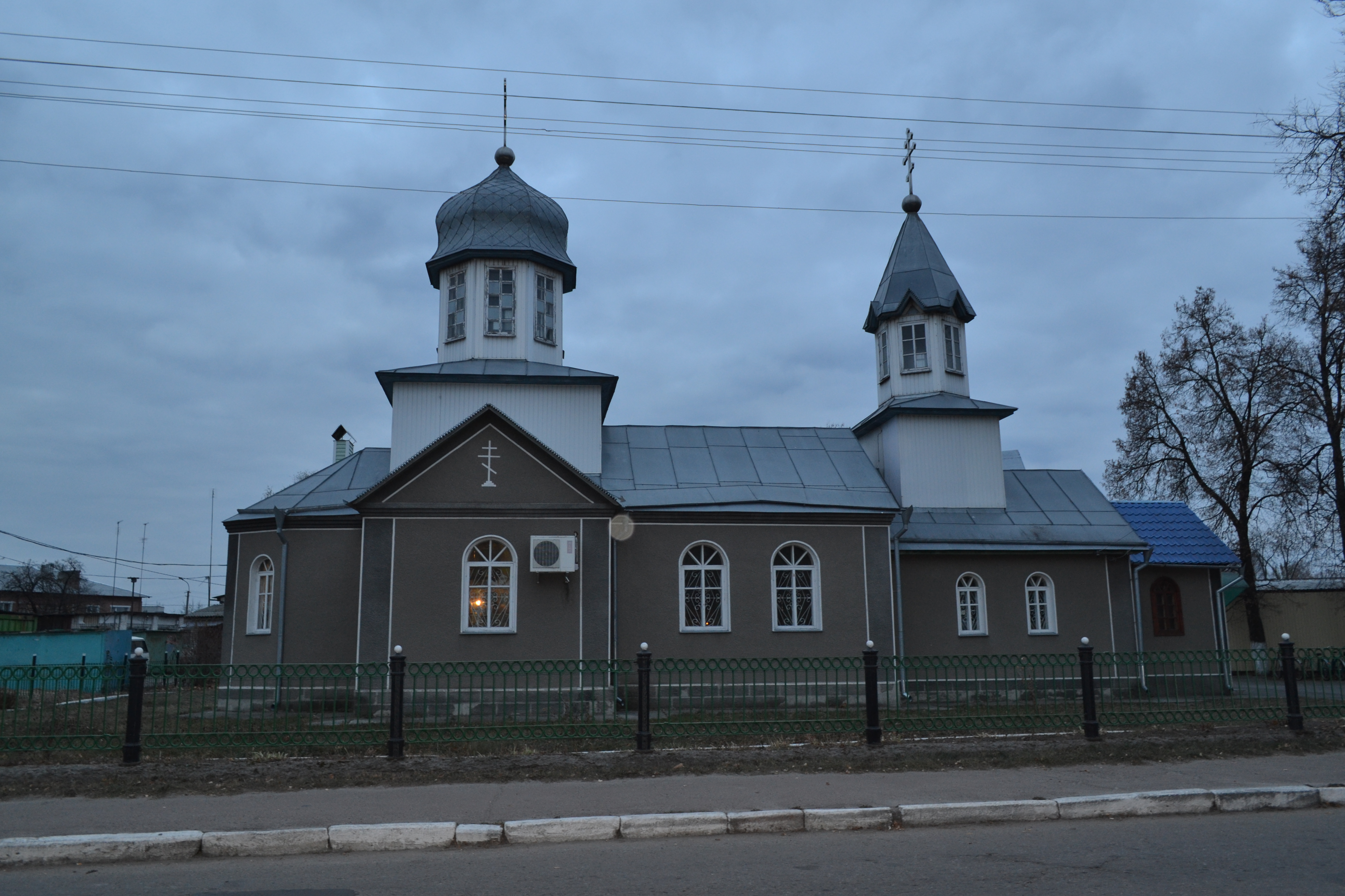 .Мена Менський район, Чернігівська область